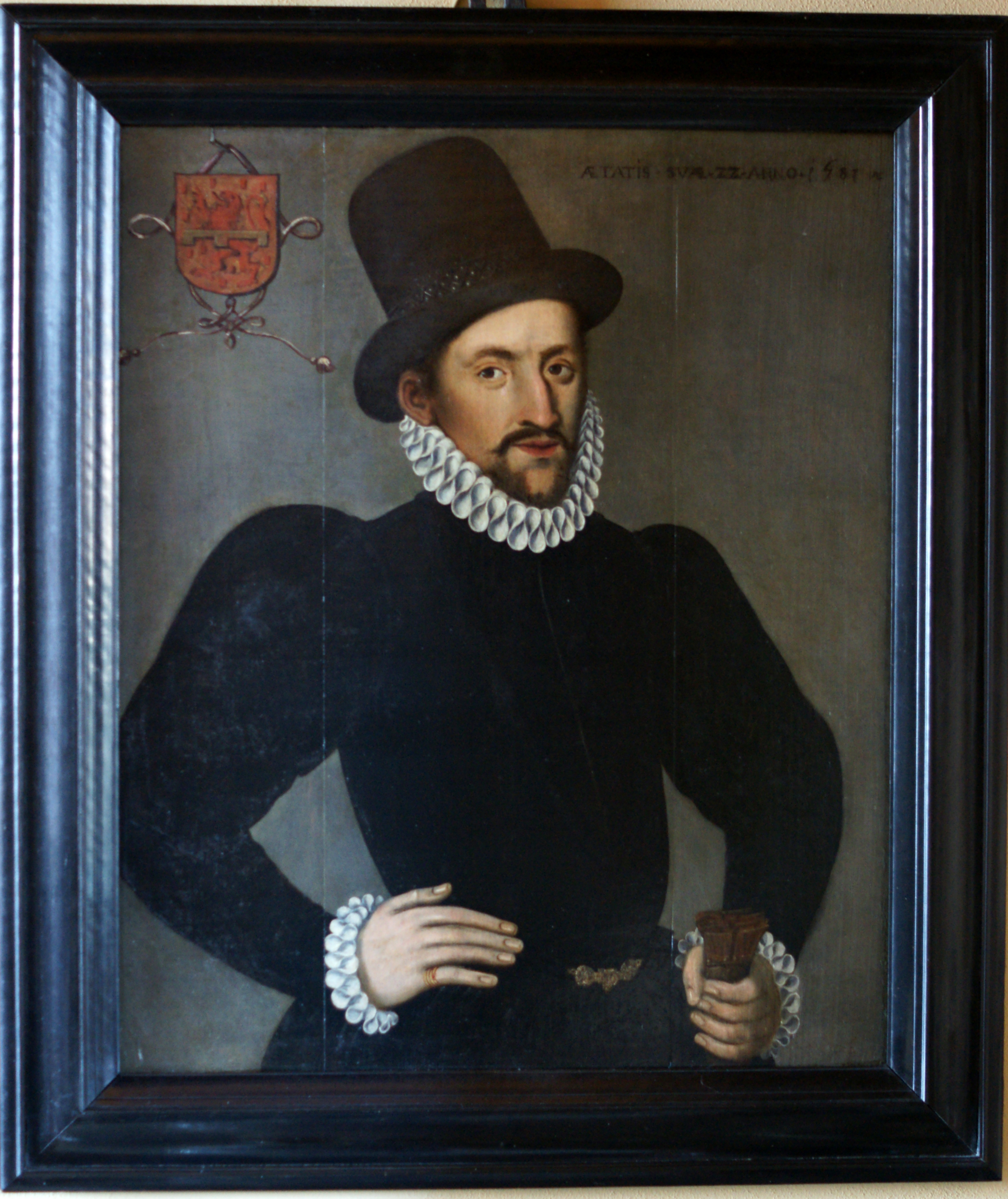 Portret van Justinus van Oranje, heer van Breda, op 22 jarige leeftijd ter halve lengte in zwart kostuum met hoed. Geannoteerd en gedateerd rechtsboven Aetatis Suae.22.Anno.1581 met wapen linksboven. Frans Pourbus II (1569-1622) Toeschrijving van Dr. R.E.O. Ekkart.